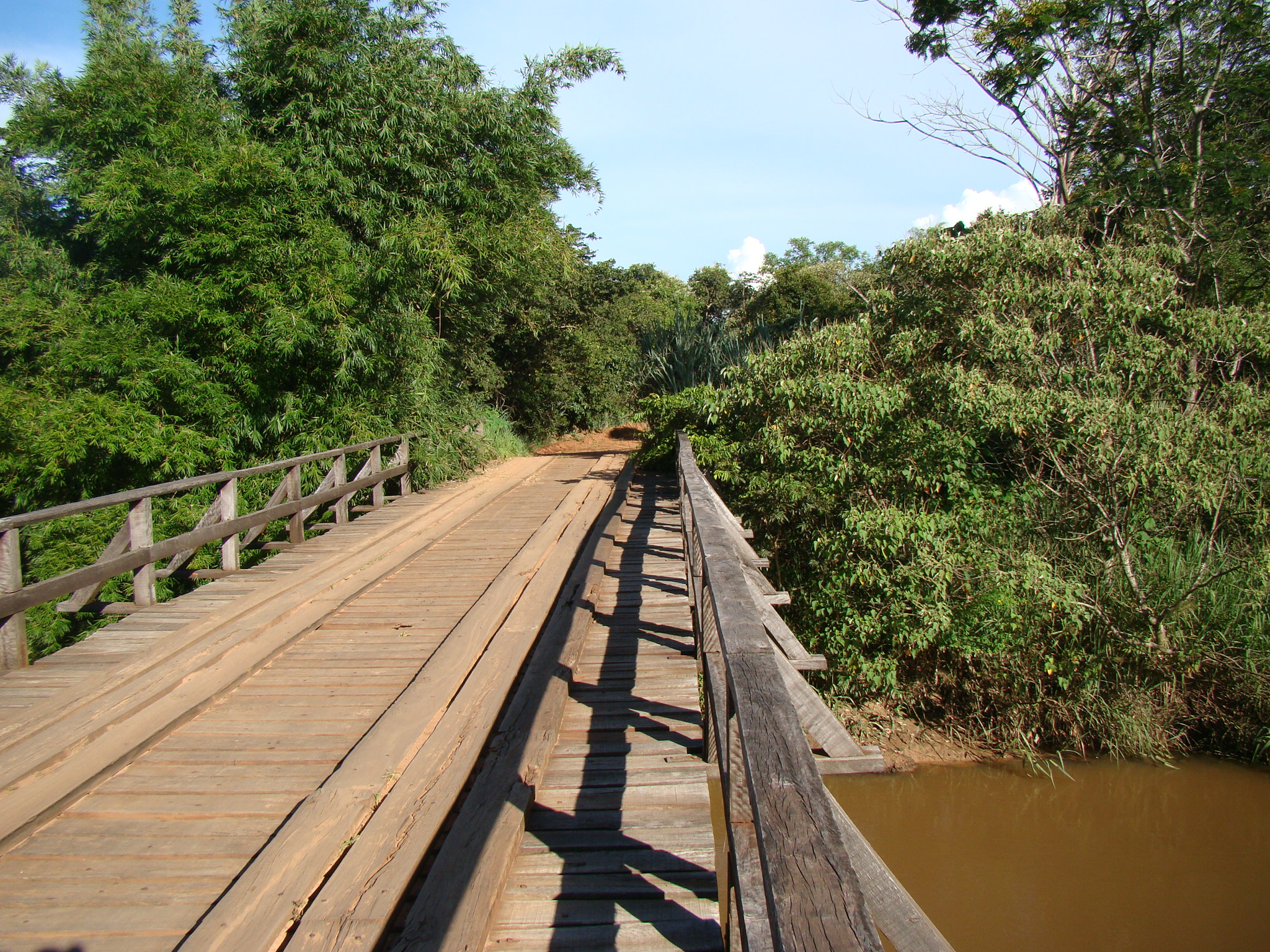 Ponte Rio Pirapozinho 2011